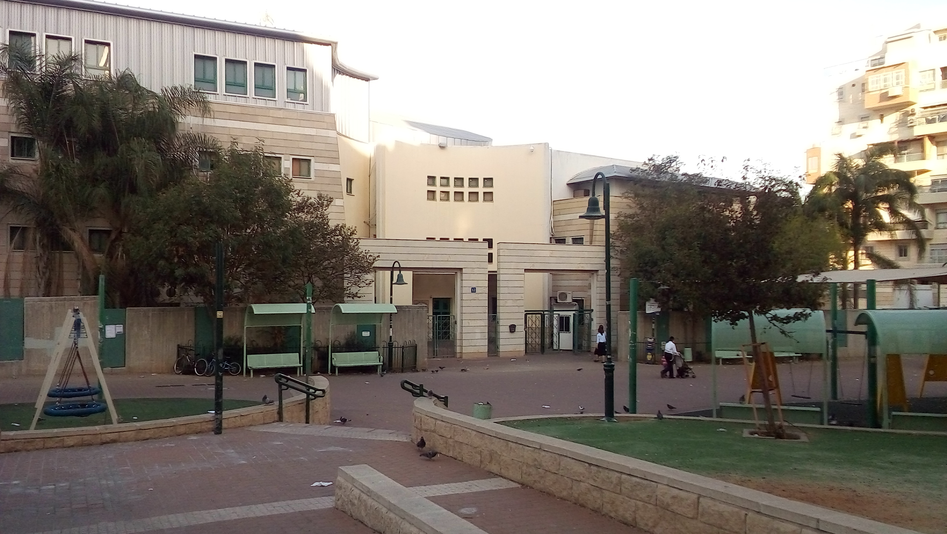 המבנה החדש ברחוב בעל התניא בבני ברק